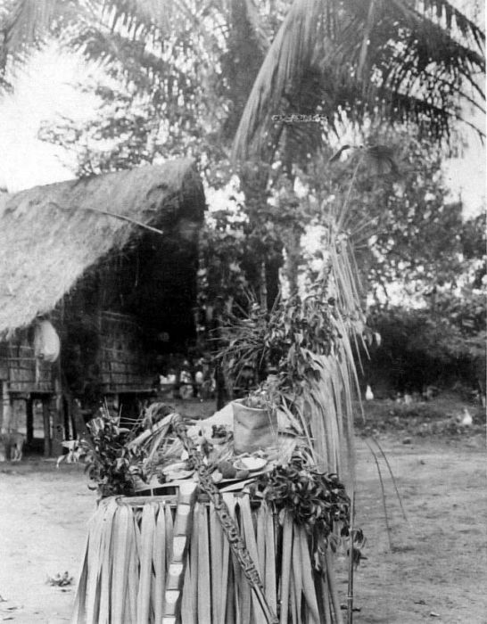 Repronegatief. Offertafel vol voedseloffers voor vooroudergeesten en een Batak toverstaf op de voorgrond